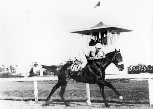 Old Rosebud winning the 1914 Kentucky Derby.ケンタッキーダービー優勝線でのオールドローズバド。